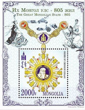 Марка Монголии с изображением ордена Чингисхана (Mongolia Souvenir Sheet: 805th Anniversary of the Mongol Empire)